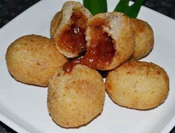 Makanan Tradisional Ondol Singkong